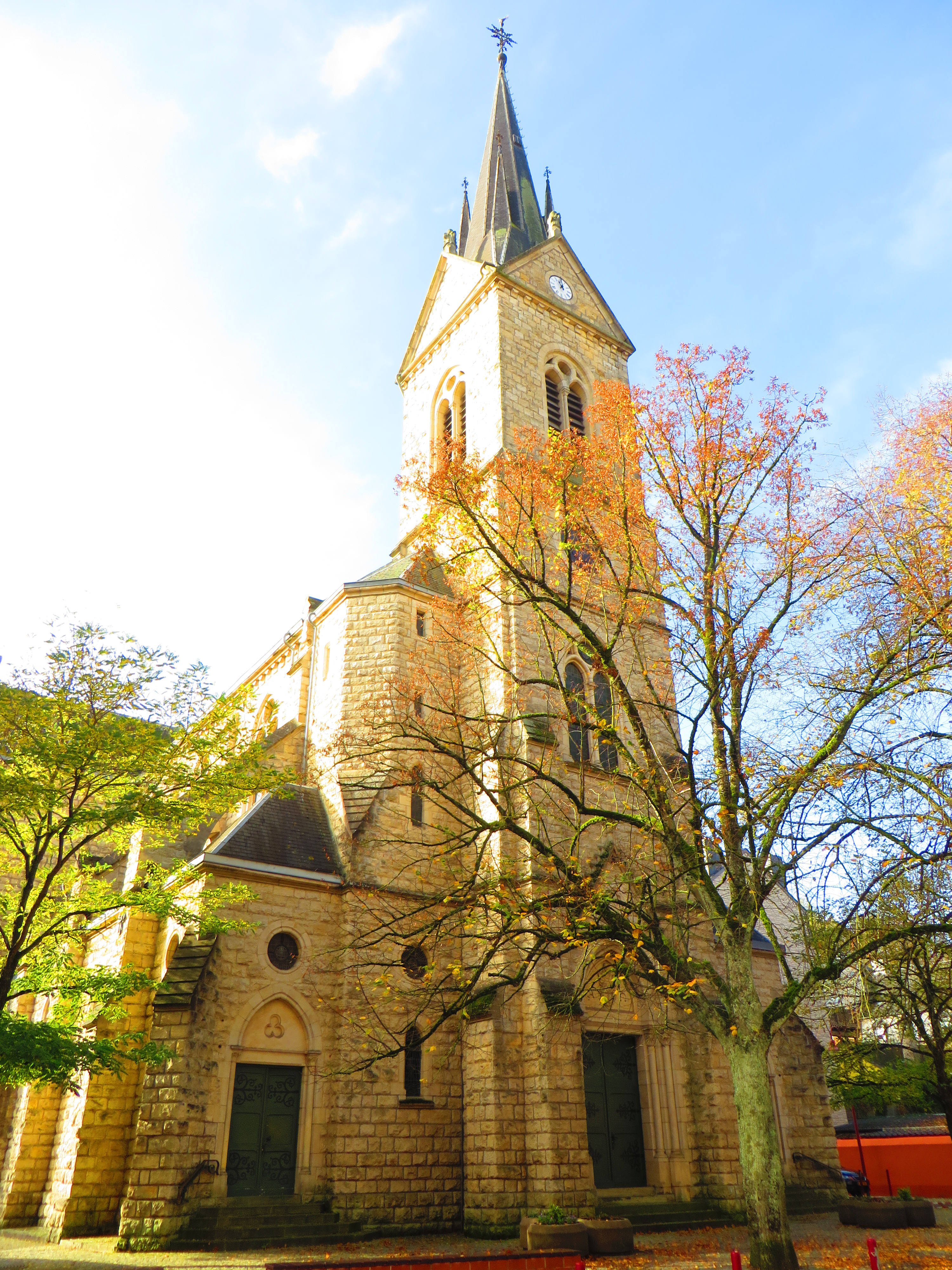 Rumelange eglise